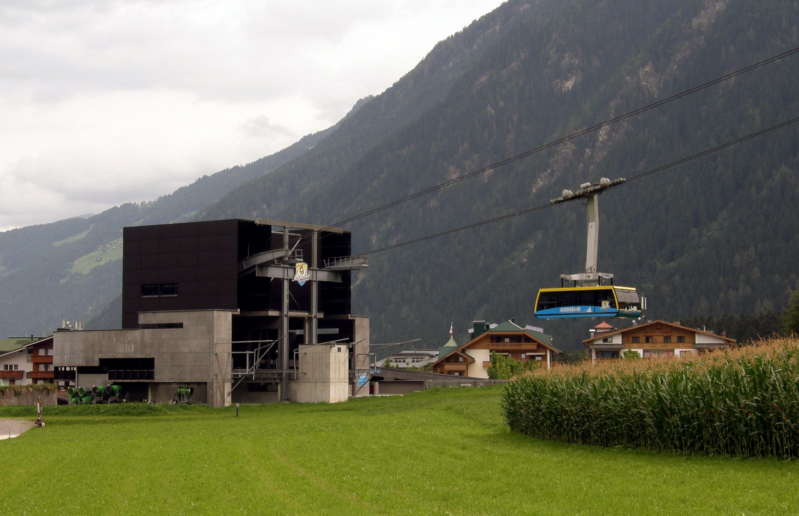 Talstation mit Gondel der Ahornbahn in Mayrhofen (Tirol, Österreich)